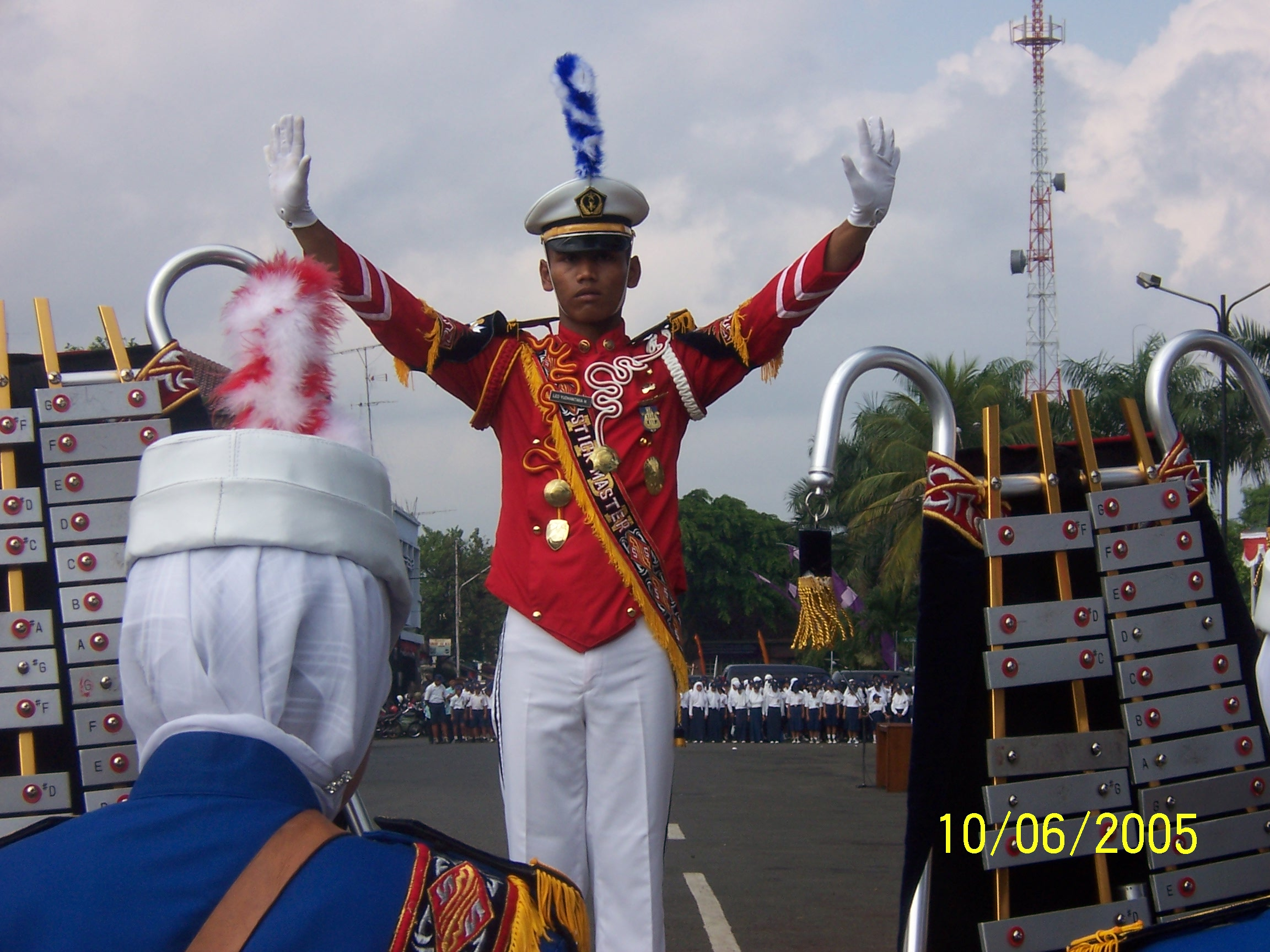 Mayoret mengambil alih fungsi sebagai Komandan Lapangan dalam sebuah parade oleh drum band STPDN